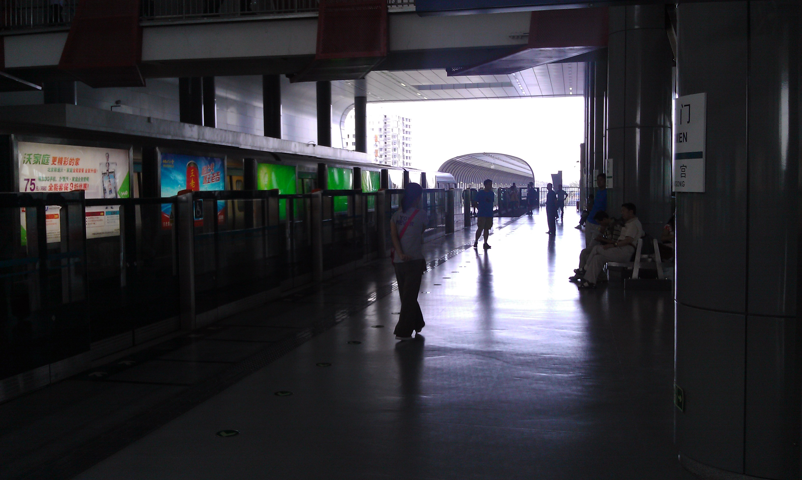 北京地铁西红门站站台及换向通道